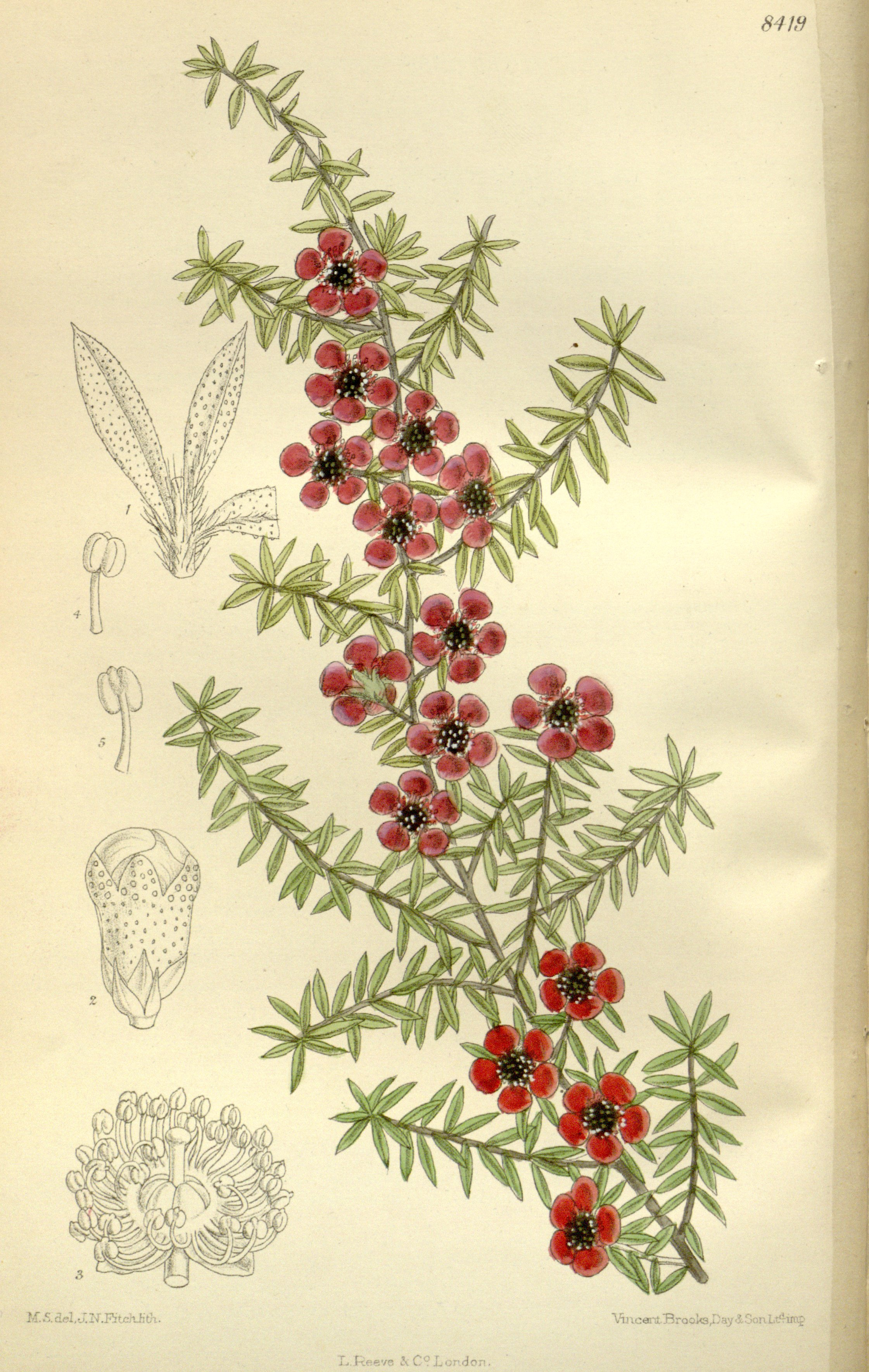 Leptospermum scoparium var. nichollii, Myrtaceae